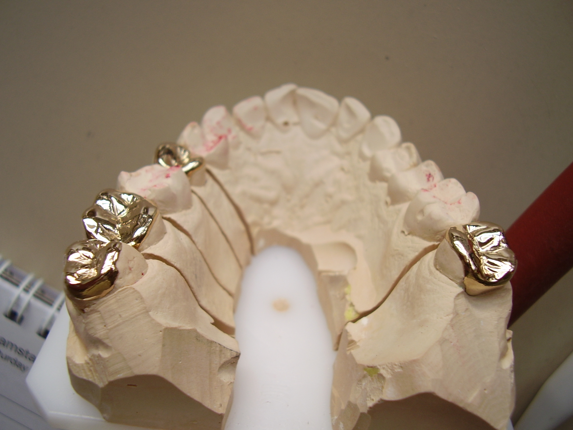 making of inlays, Sägemodell, weiße Trägerplatte des Gipsmodells aus Kunststoff, die Sägeschnitte jeweils vor und hinter dem Zahn mit dem Inlay sind sichtbar, genaugenommen handelt es sich nicht um 4 Inlays, sondern 4 Teilkronen, da die Kauflächen vollständig von Metall abgedeckt sind (eingefasst sind)